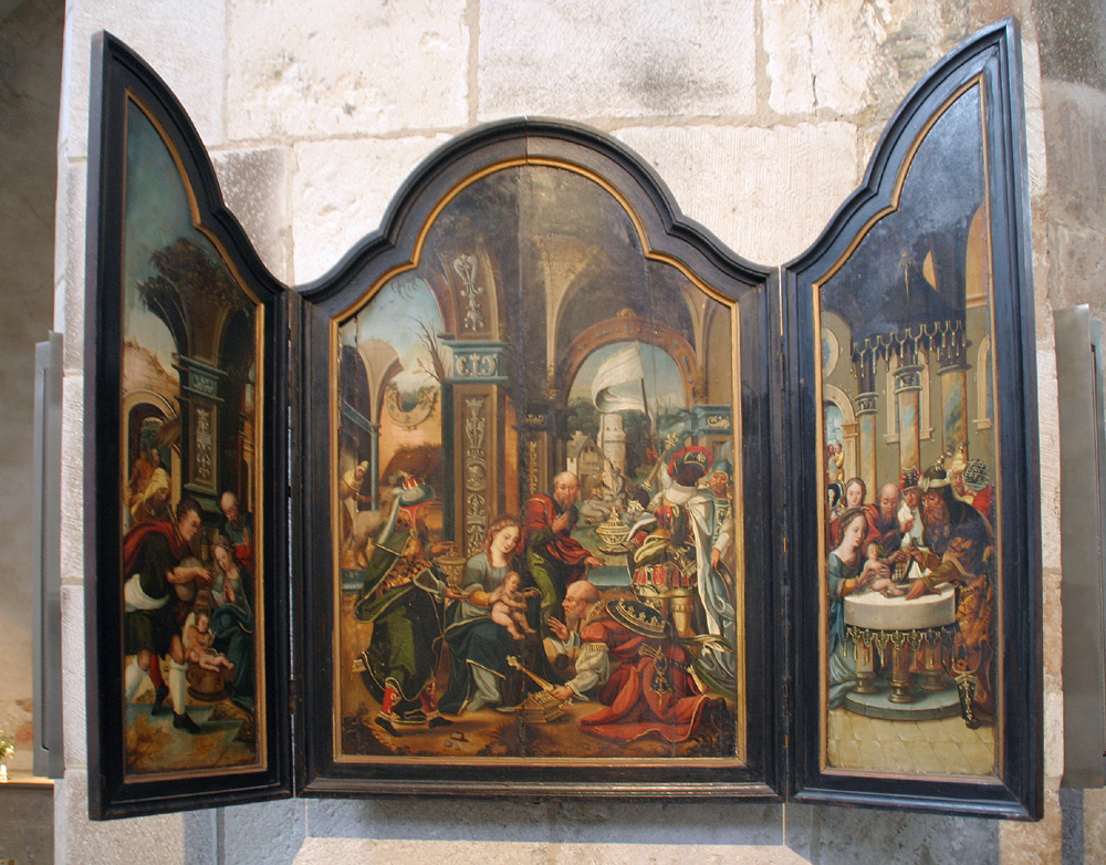 Groß St. Martin, Köln. Dreikönigstripychon, 1530